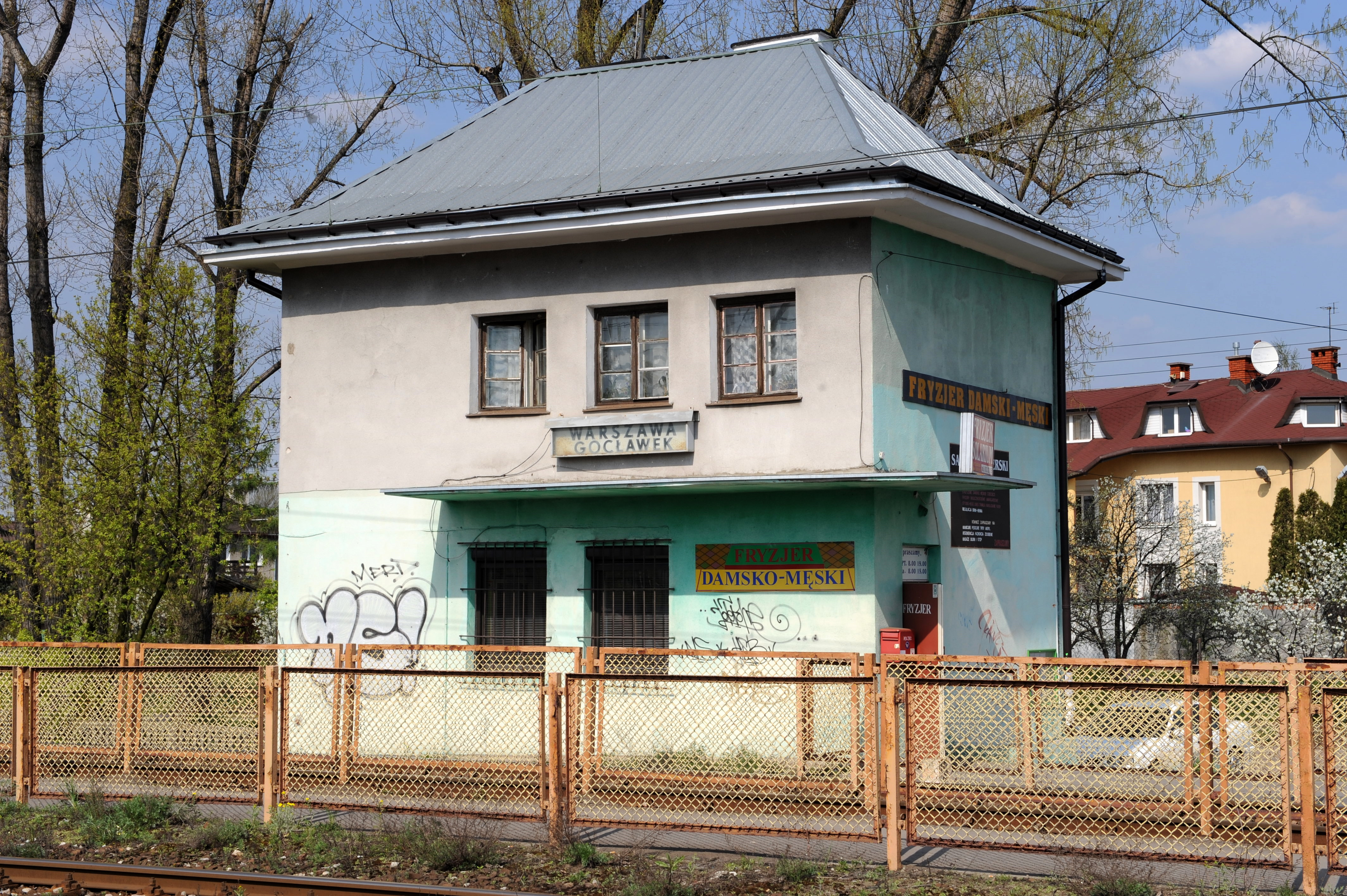 Nastawnia na stacji kolejowej Warszawa Gocławek